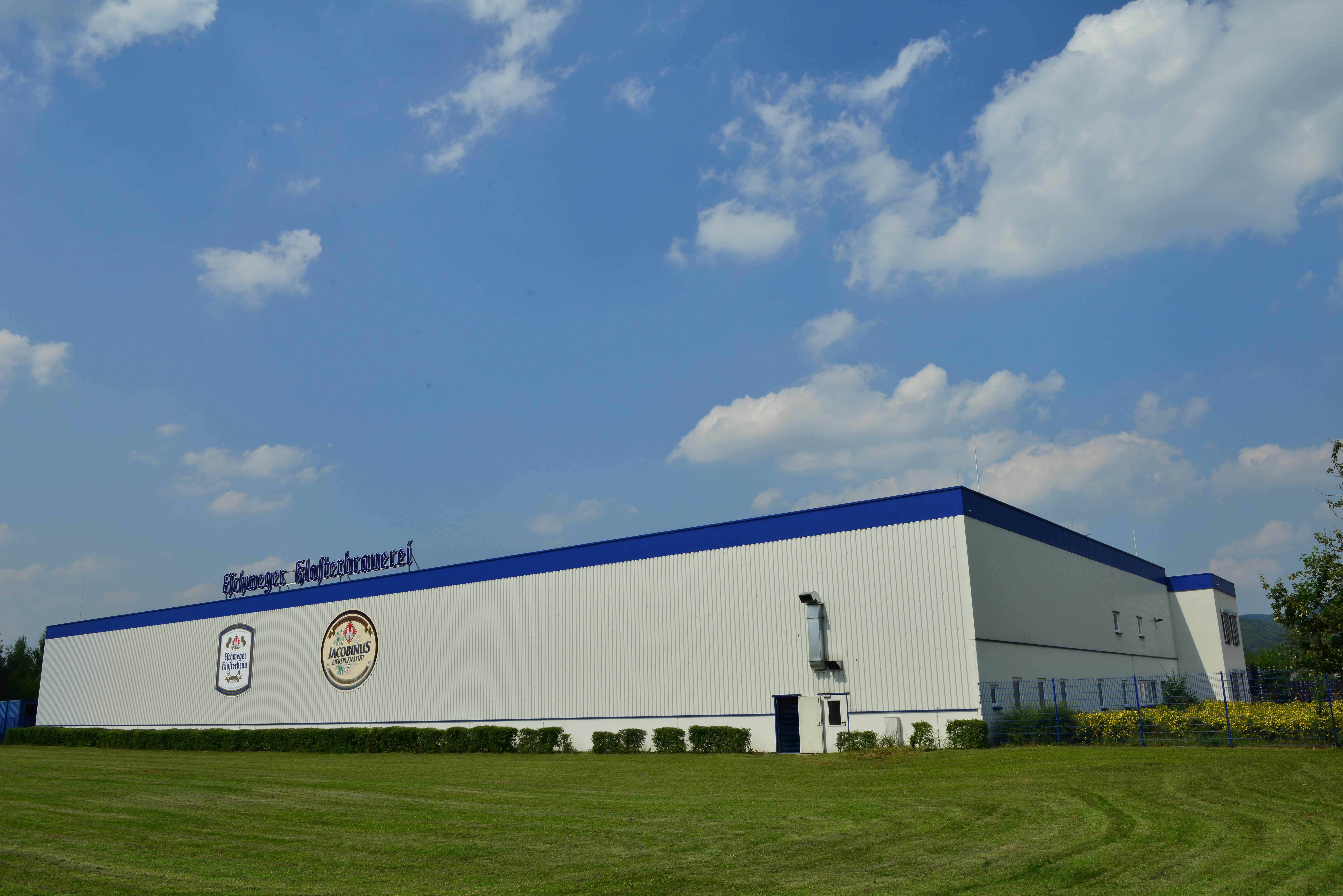 Verwaltung und Logistik der Eschweger Klosterbrauerei befinden sich im Neubau in der Thüringer Straße 19, Eschwege